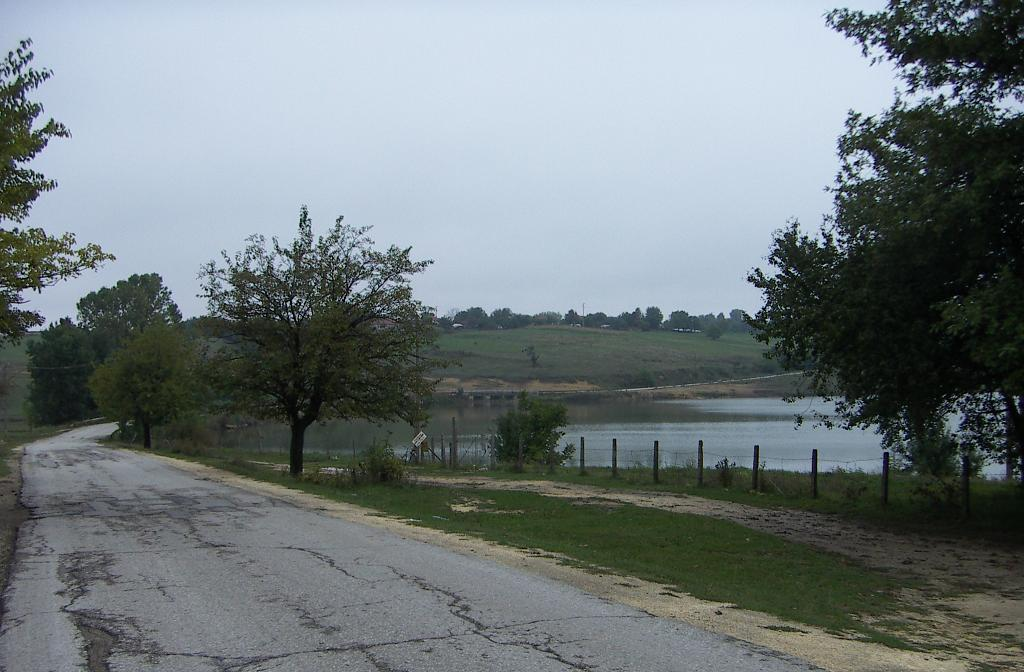 Lisans